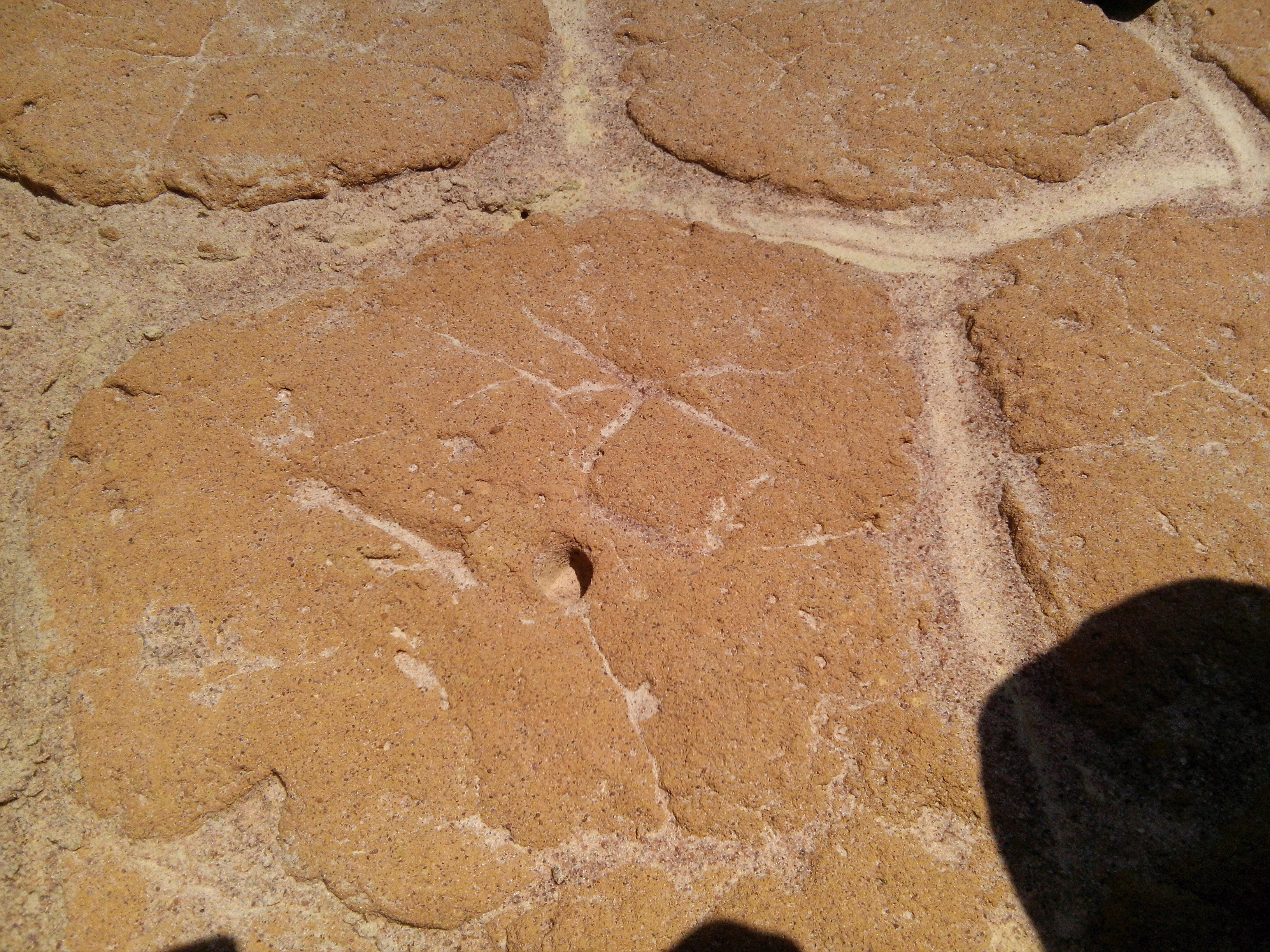 அம்பலத்திடல் தரையமைப்பு